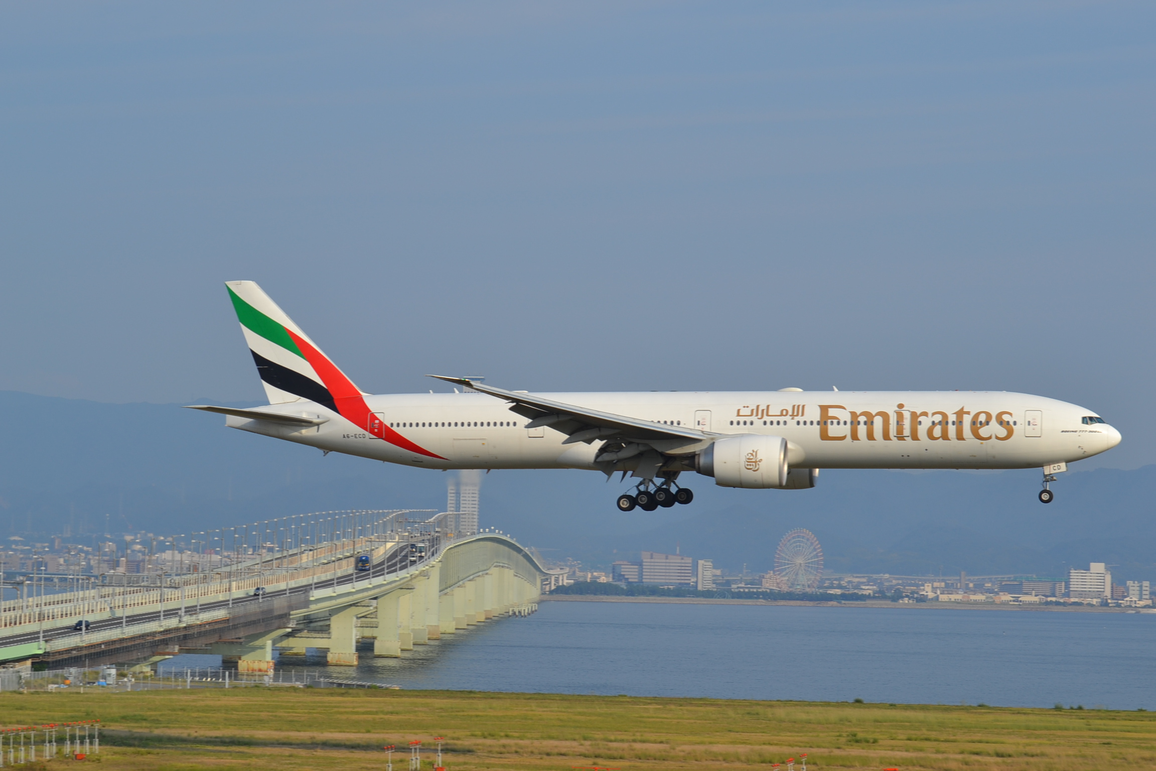 Boeing 777/3 of Emirates Airlines at Osaka Kansai-KIX,Japan,28/08/13.